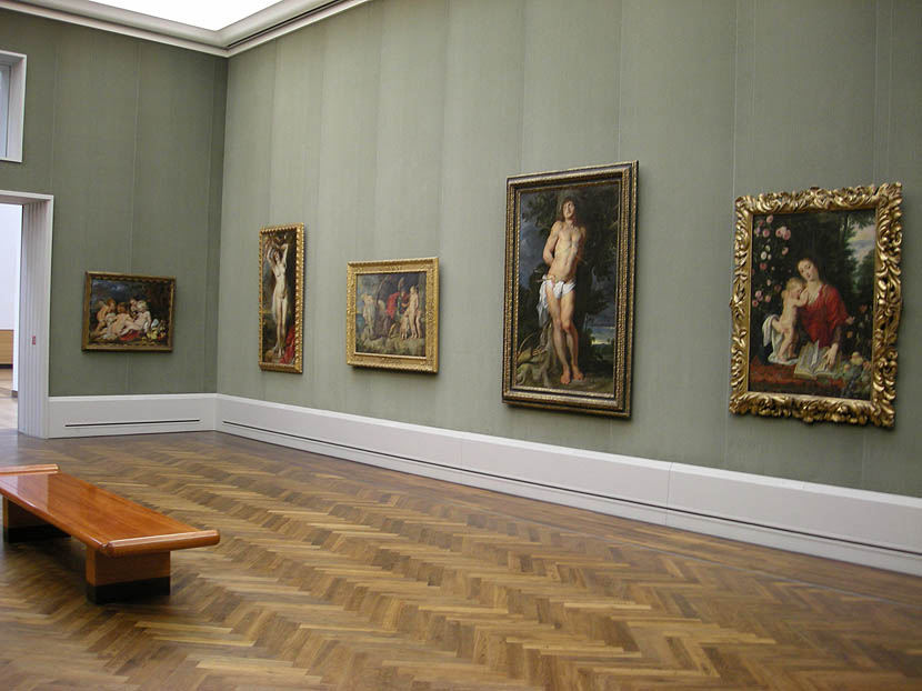 Gemäldegalerie Berlin. Interieur. Rubens-Saal